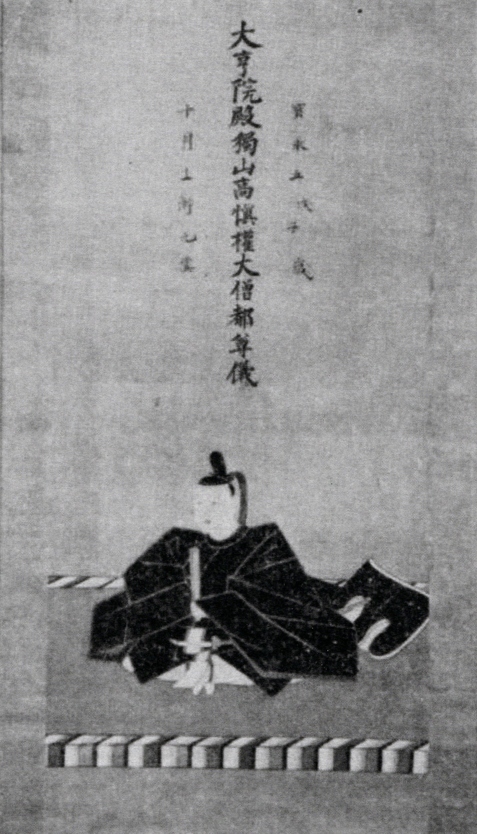 藤堂高睦の肖像(モノクロ)。